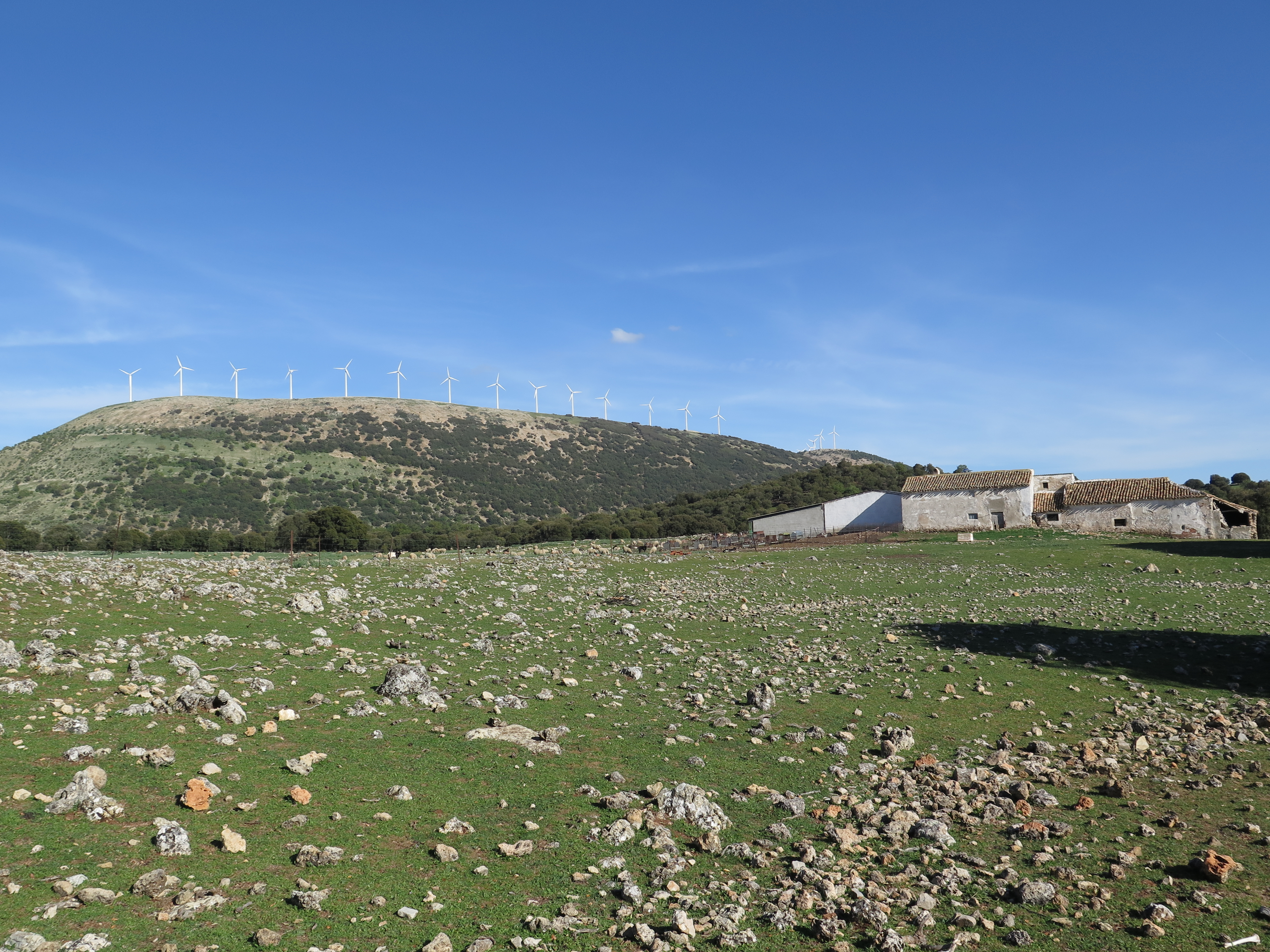 Sierra del Trigo vista desde la Loma del Potro. A la derecha, el cortijo de Covaterrizas.